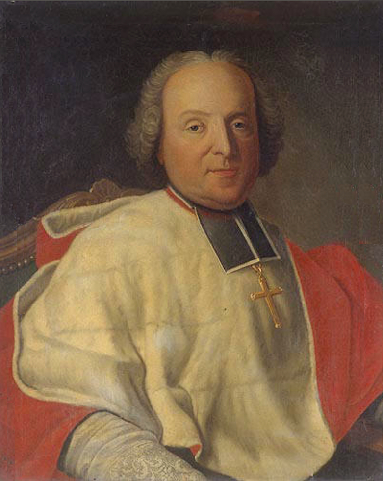 Portrait of Cardinal de Choiseul (1707-1774)